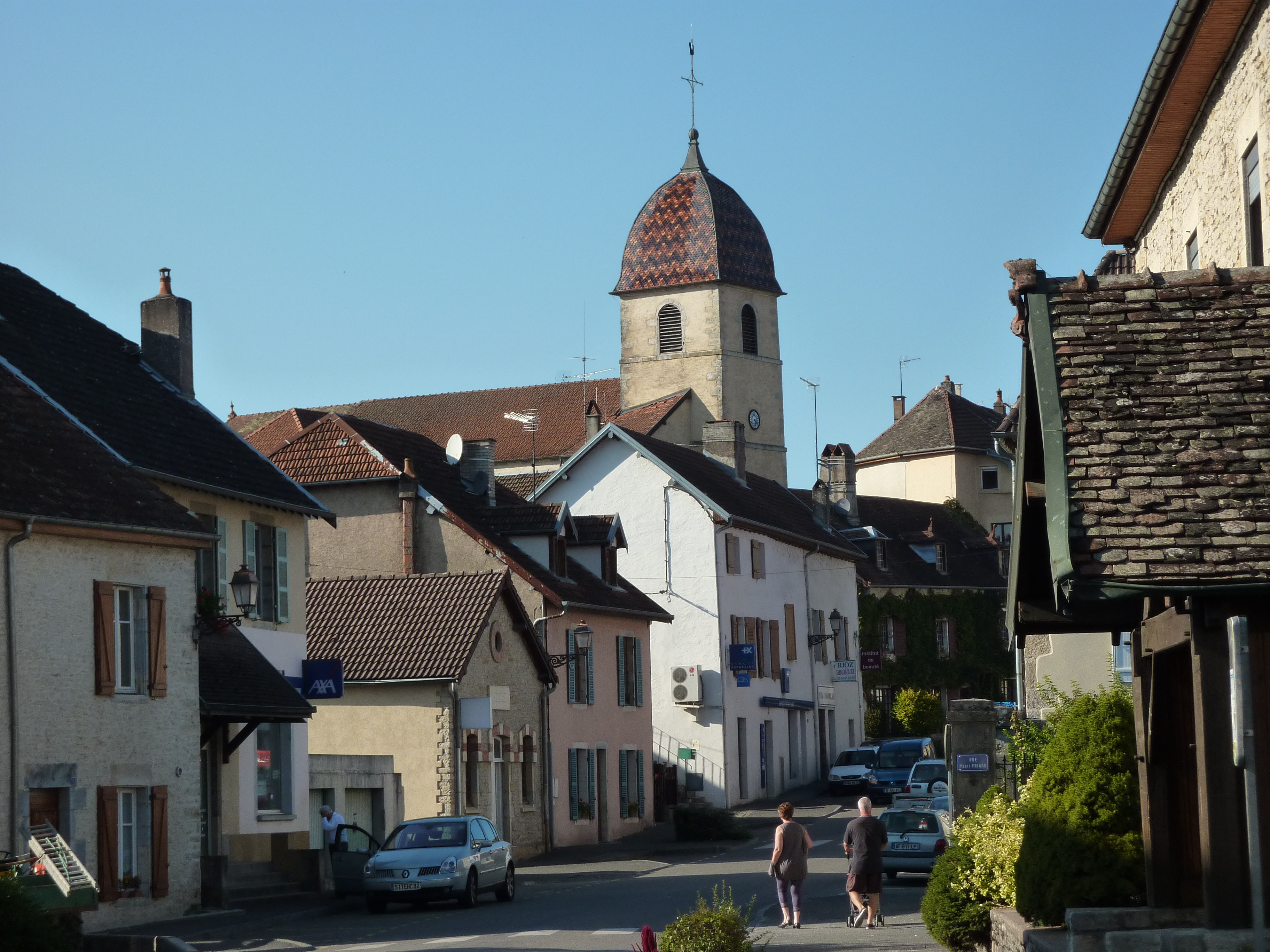 Rioz, vue du village depuis la rue principale (Charles de Gaulle) avec l'église au clocher bulbeux typiquement comtois.